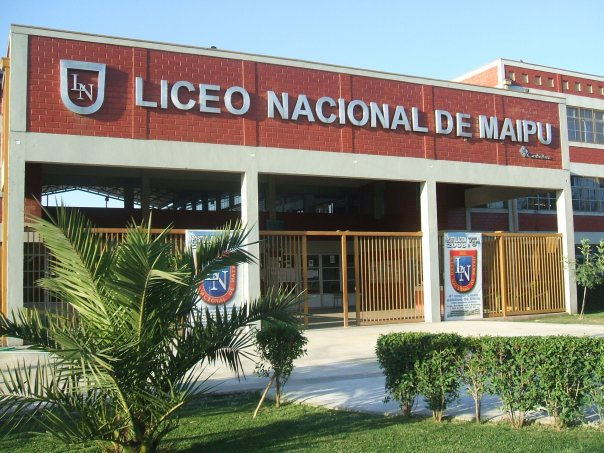 Vista frontal del Liceo Nacional de Maipú